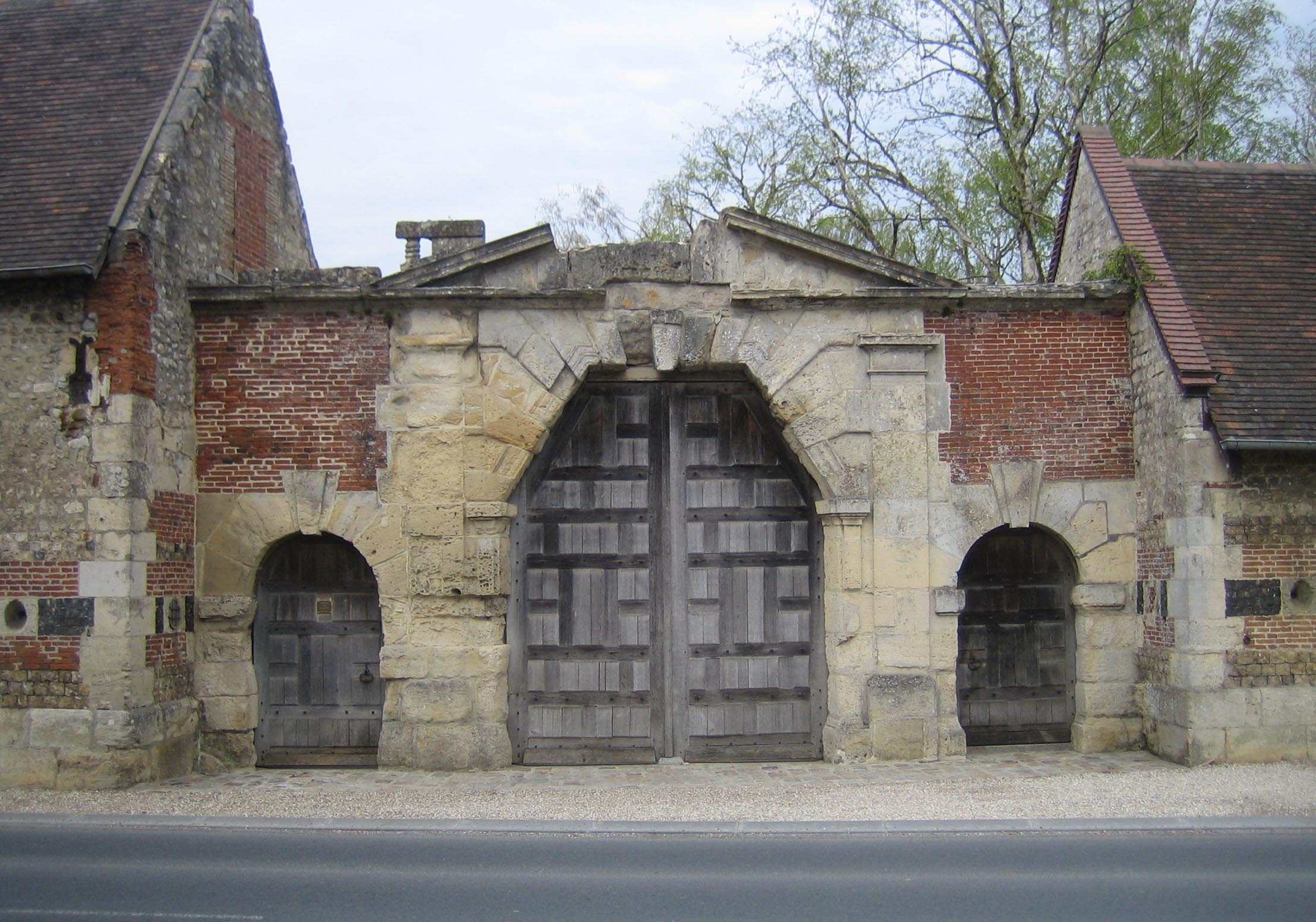 Portail du Haras de Meautry à Touques.